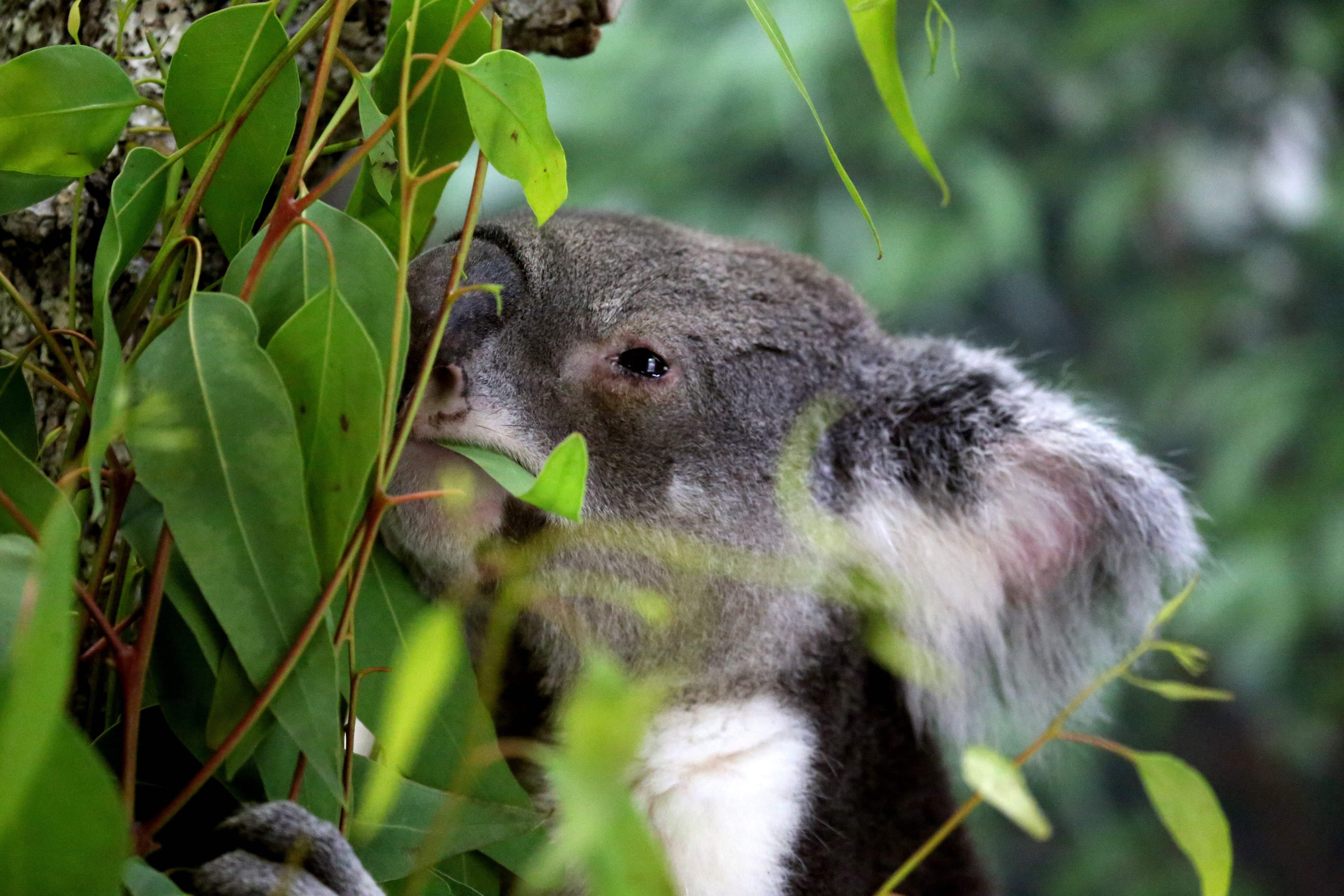 Un koala se nourrit sur un eucalyptus dans l'État du Queensland, en Australie, en 2014.